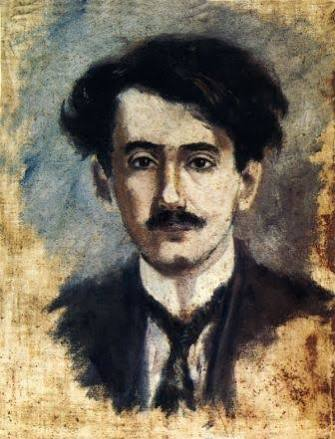 Autoretrato del peruano José María Eguren. Circa 1908 (aproximadamente ese año).